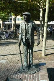 De Hapertse Gaper is een beeld dat symbool staat voor de inwoners van Hapert